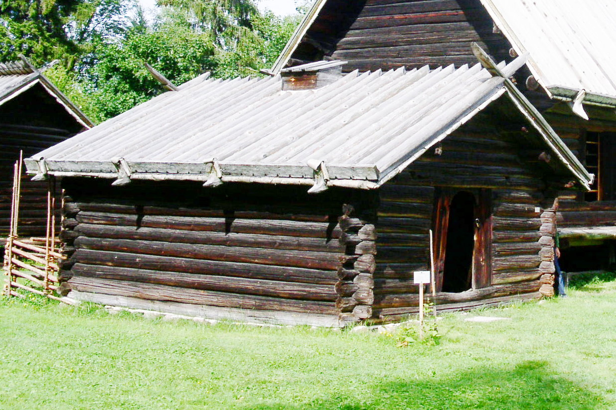 Eldhuset vid Zoorns gammelgård i Mora